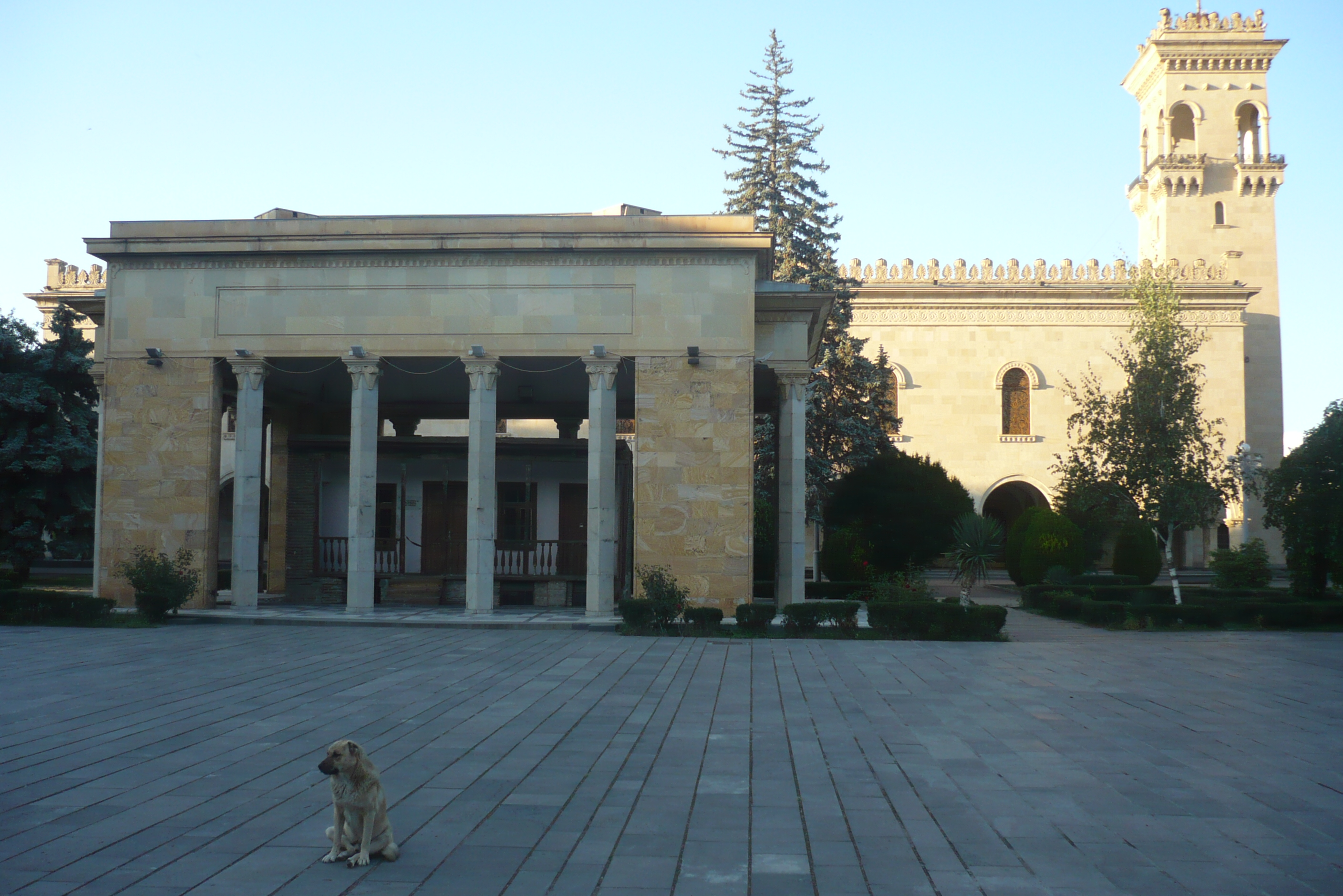 Stalinův rodný dům